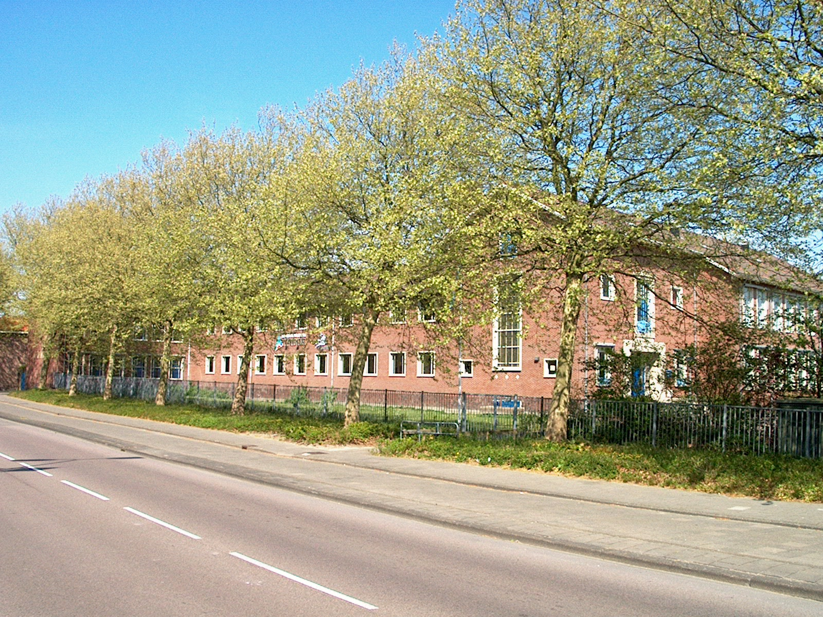 Tabor Scholengemeenschap, locatie "Werenfridus", Hoorn, Nederland